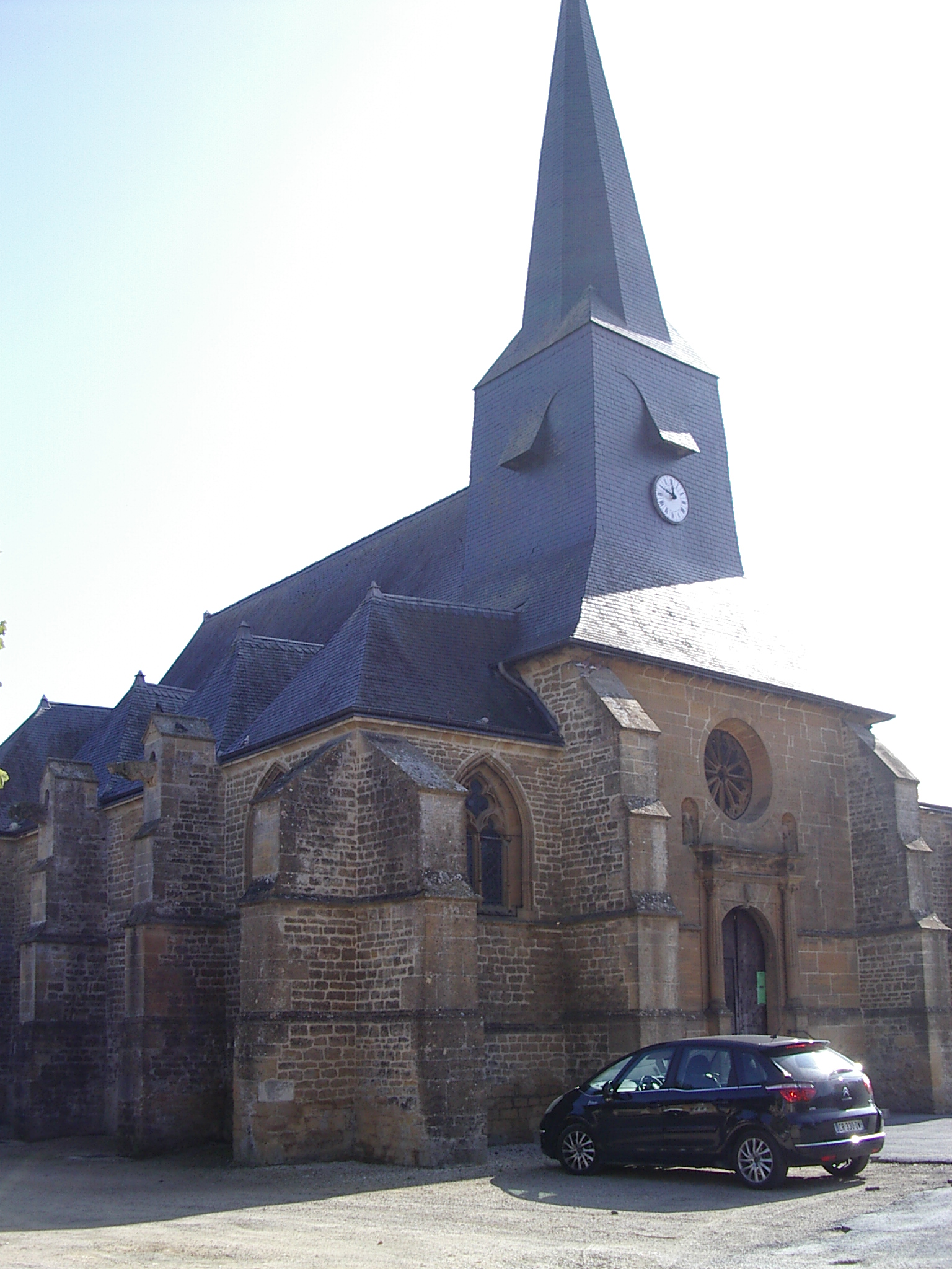 Église Saint-Pierre de Villers-Semeuse